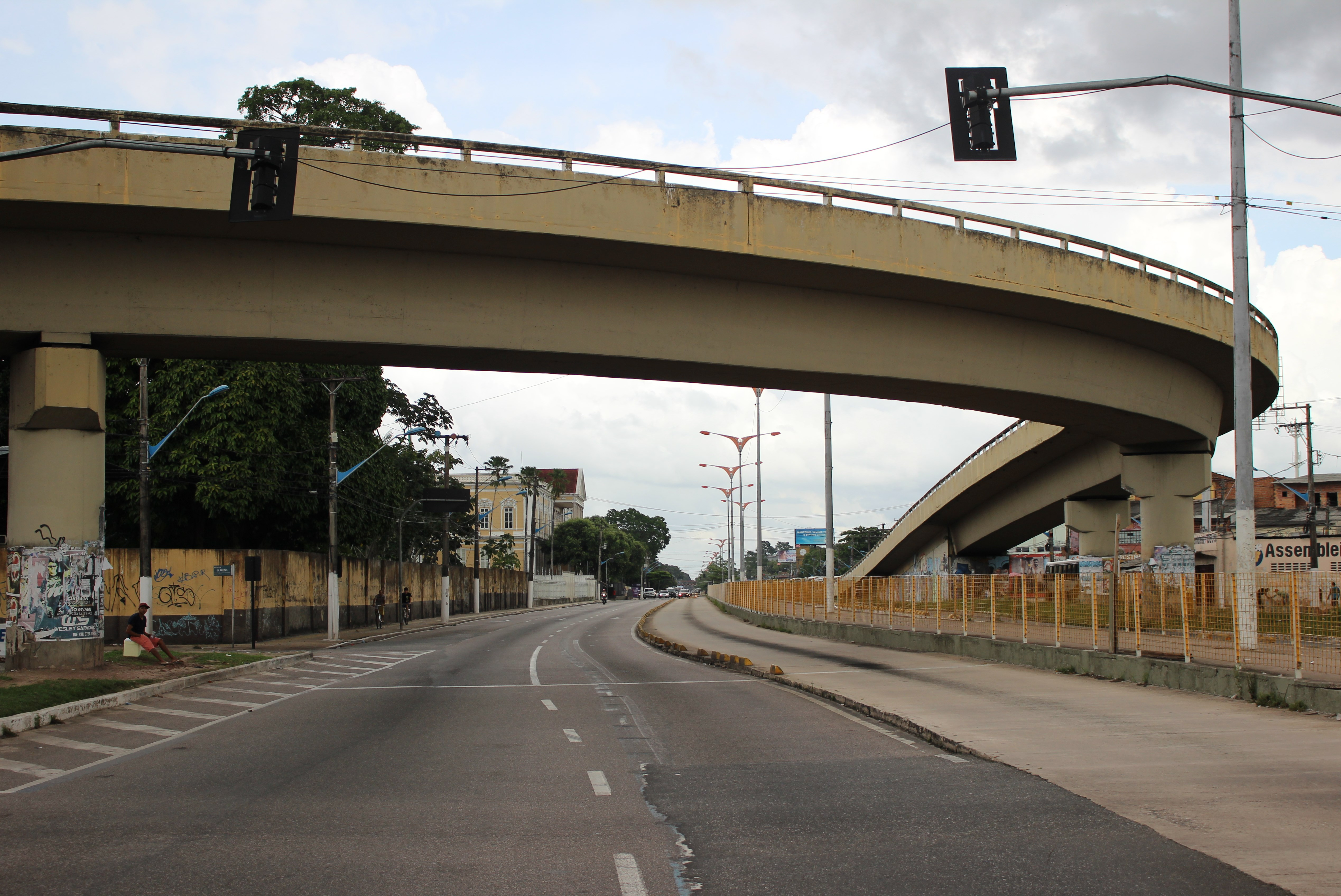 Em primeiro plano,elevado da avenida Doutor Freitas.